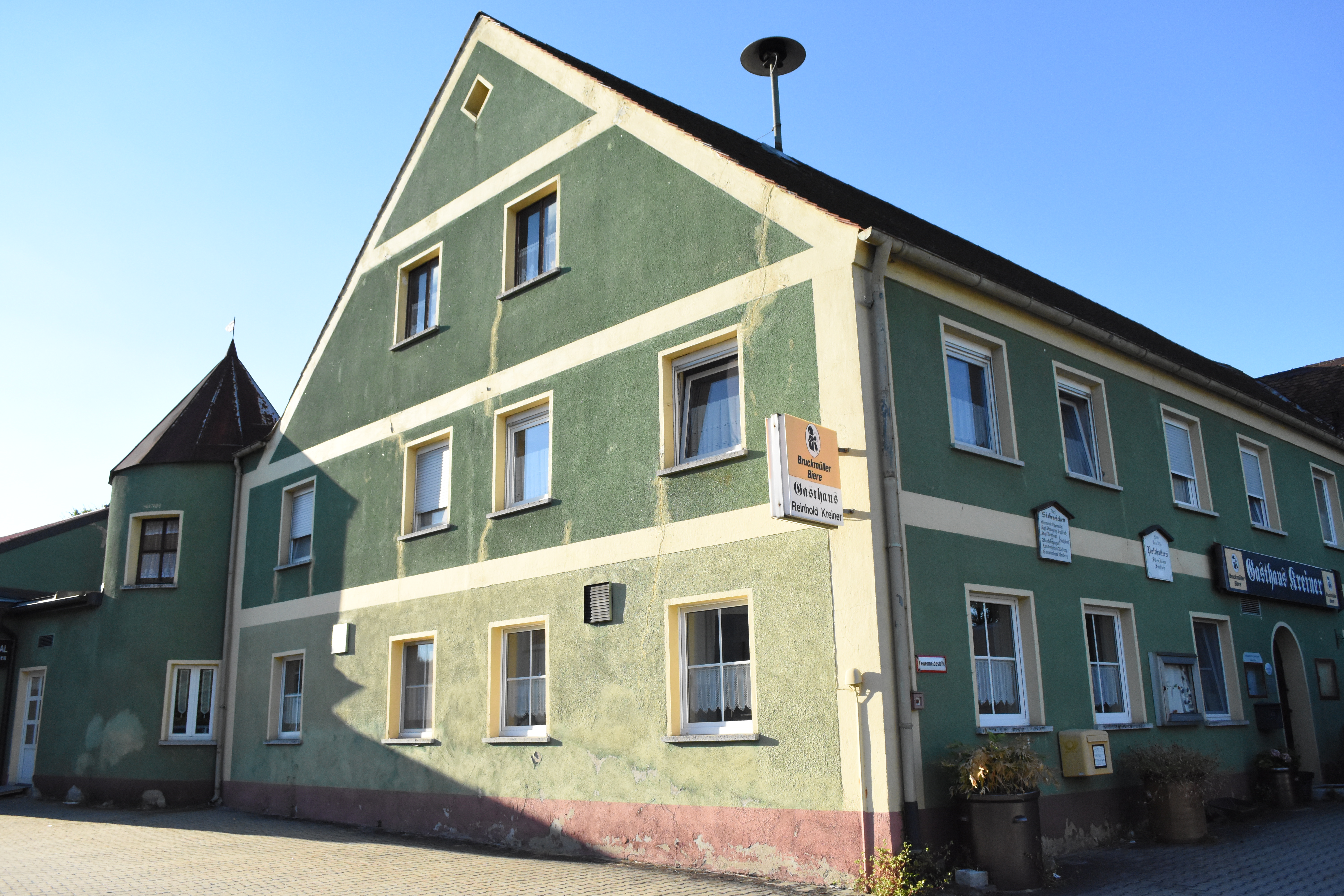 Sulzbach-Rosenberg-Umgebung, Siebeneichen 1: Gasthaus und ehemalige Posthalterei, ″1798“, im Kern wohl älterThis is a photograph of an architectural monument.